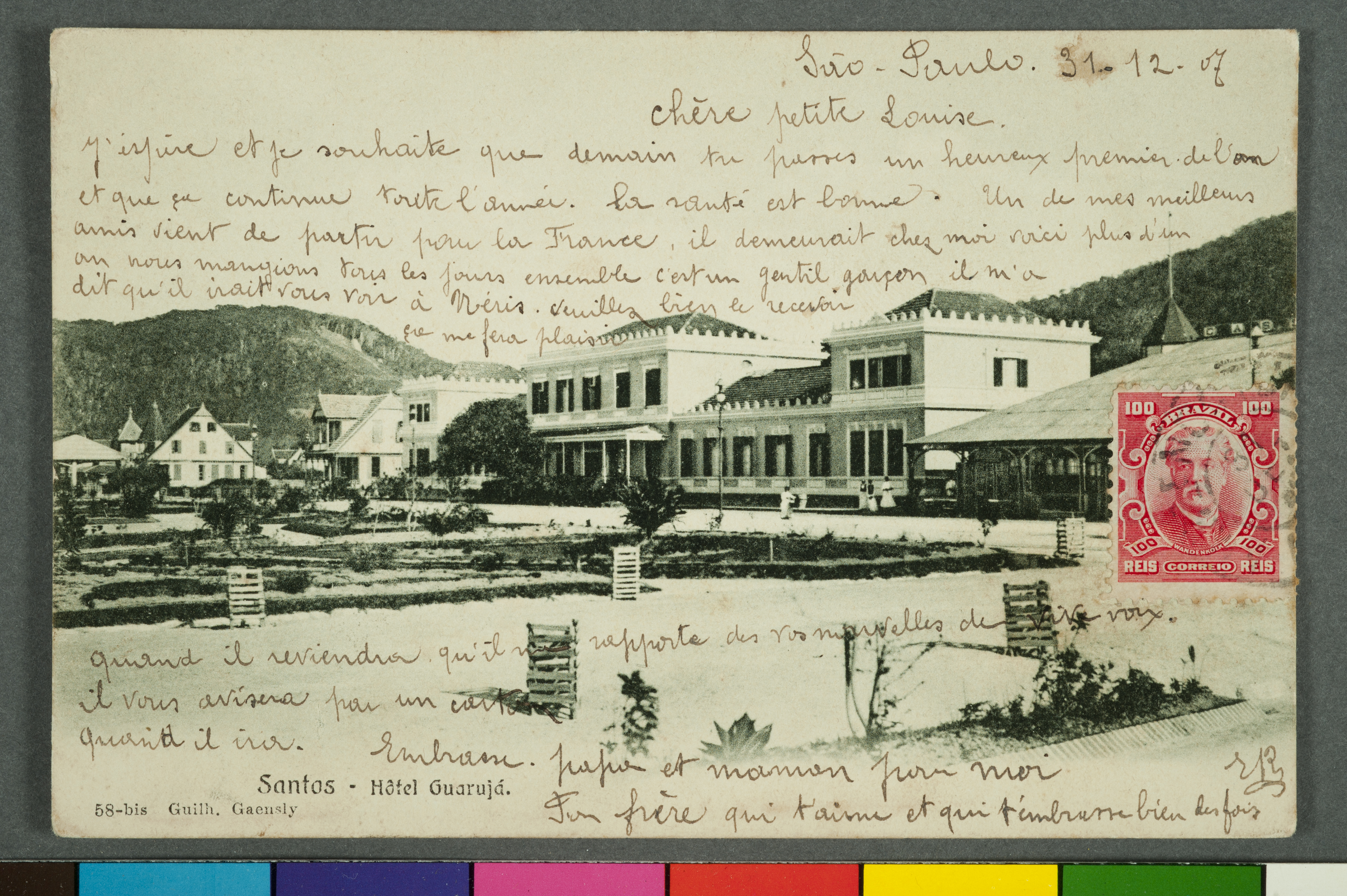 Obra que integra o acervo do Museu Paulista da USP.